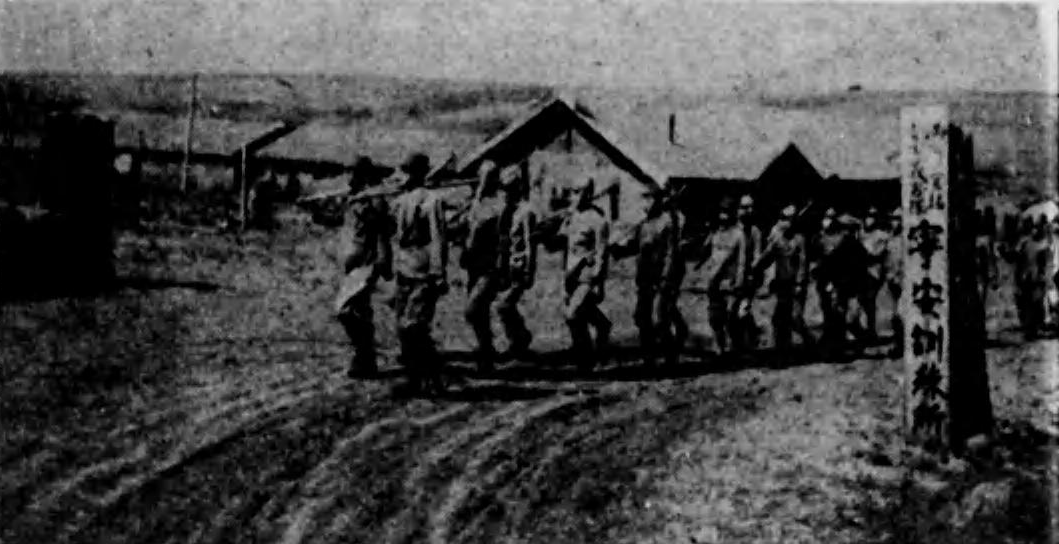 満蒙開拓団 寧安訓練所 徒歩旅行 体位向上